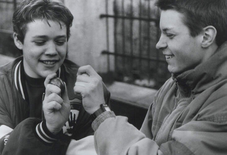 Beim Eierhärten Fotograf: Walter J. Pilsak, Waldsassen (Die abgebildeten Personen sind mit dem Copyright Status des Bildes einverstanden) Copyright Status: GNU Freie Dokumentationslizenz